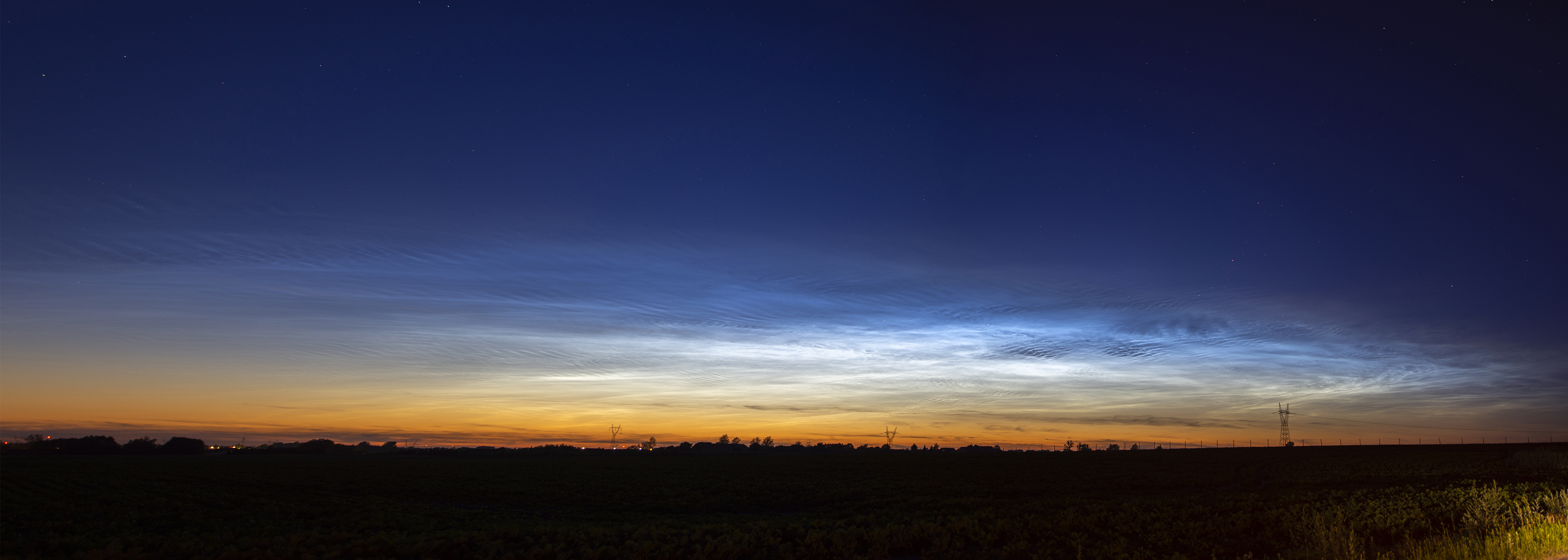 Noctilucent clouds